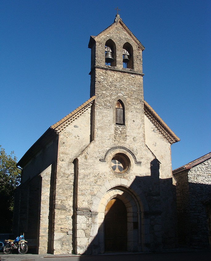 La façade de l'église de Barcillonnette : mur-clocher traditionnel, avec œil de bœuf contenant une croix pattée.